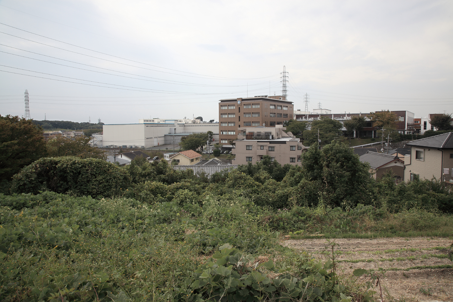 石塚山比定地を望む（豊明市、2012年）